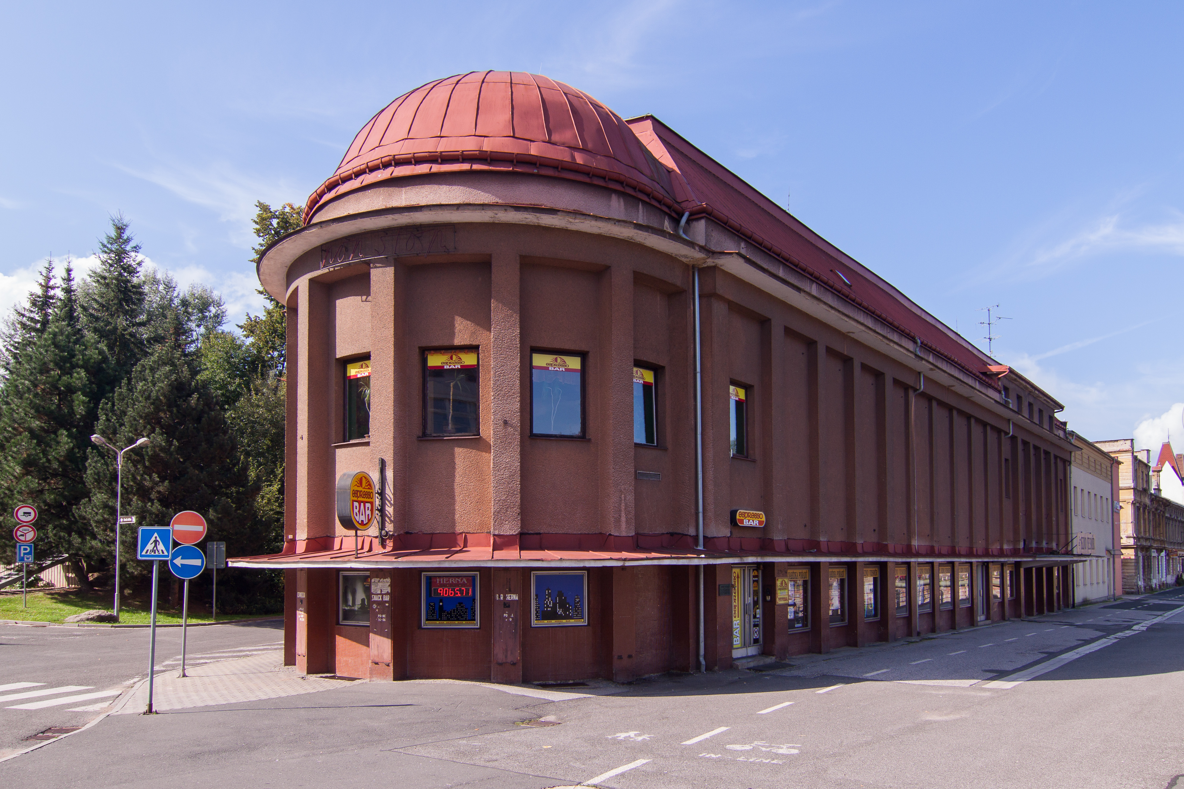 Kino Vesmír, Revoluční 20, Trutnov